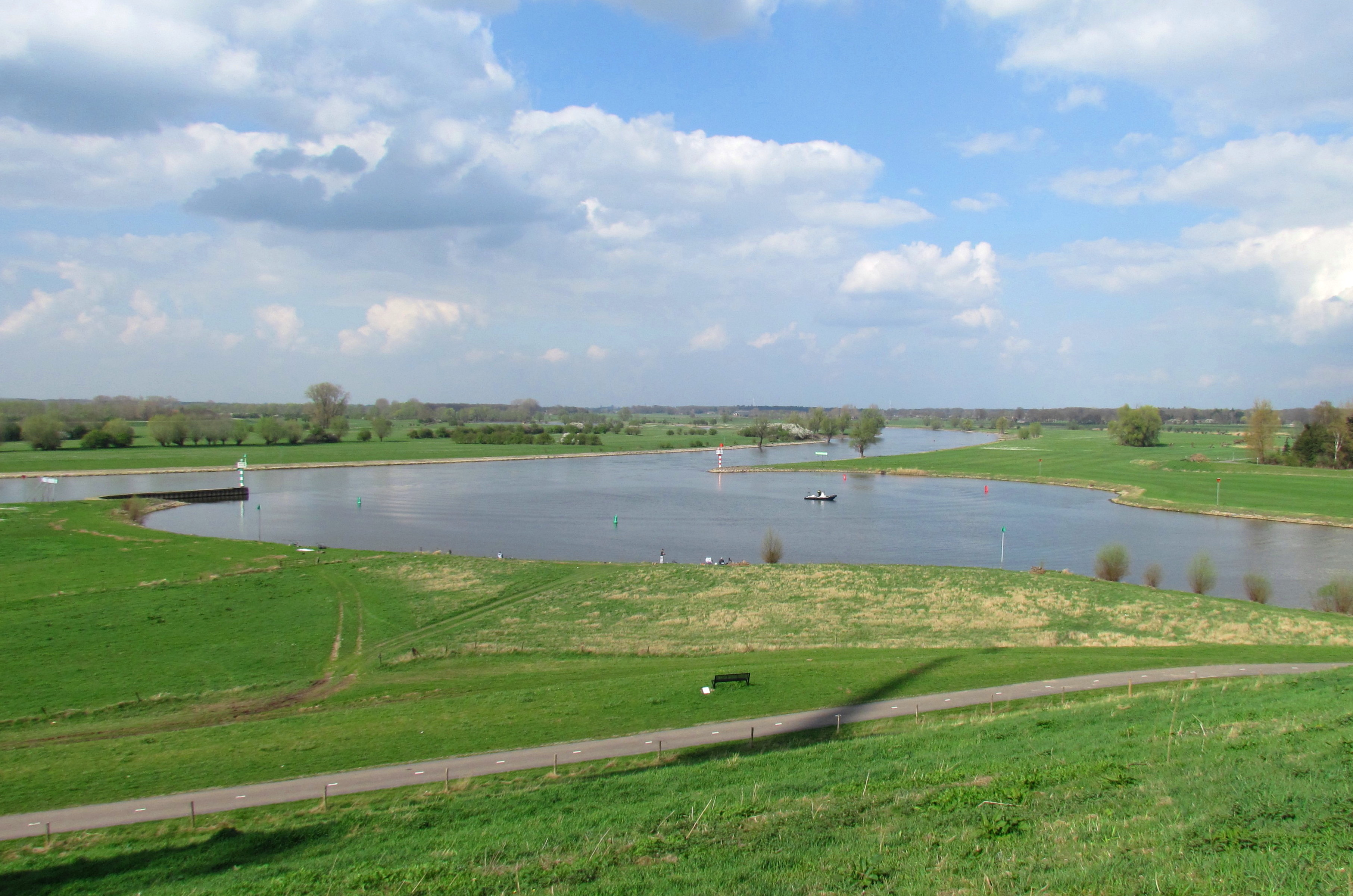 Zwaaikom die het punt vormt waar het Twentekanaal (rechts) in de Geldersche IJssel uitkomt, ten noorden van Zutphen